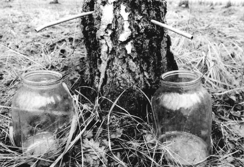 Colditz, Birkensafternte ADN-ZB Kluge 4.4.1985 Bez. Leipzig: Birkensafternte - Ihre diesjährige Birkensafternte bringen gegenwärtig die Forstarbeiter des Colditzer Reviers ein. Dazu bohren sie etwa 4.000 Birken an und stecken Metallröhrchen in die Löcher - pro Baum ein bis drei Stück. Aus diesen Zapfstellen tropfen täglich etwa zwei Liter Birkensaft in die bereitgestellten Gläser. Mit großen Kannen ziehen die Forstarbeiter während der zweiwöchigen Erntezeit durch den Wald und leeren die Gläsr. Der gewonnene Saft - in diesem Jahr rund 80.000 Liter - wird gefiltert, mit Alkohol und Esther versetzt und an die Kosmetikindustrie geliefert. Die Bohrlöcher werden nach der zweiwöchigen Erntezeit wieder verpfropft. - siehe auch 1985-0404-3N